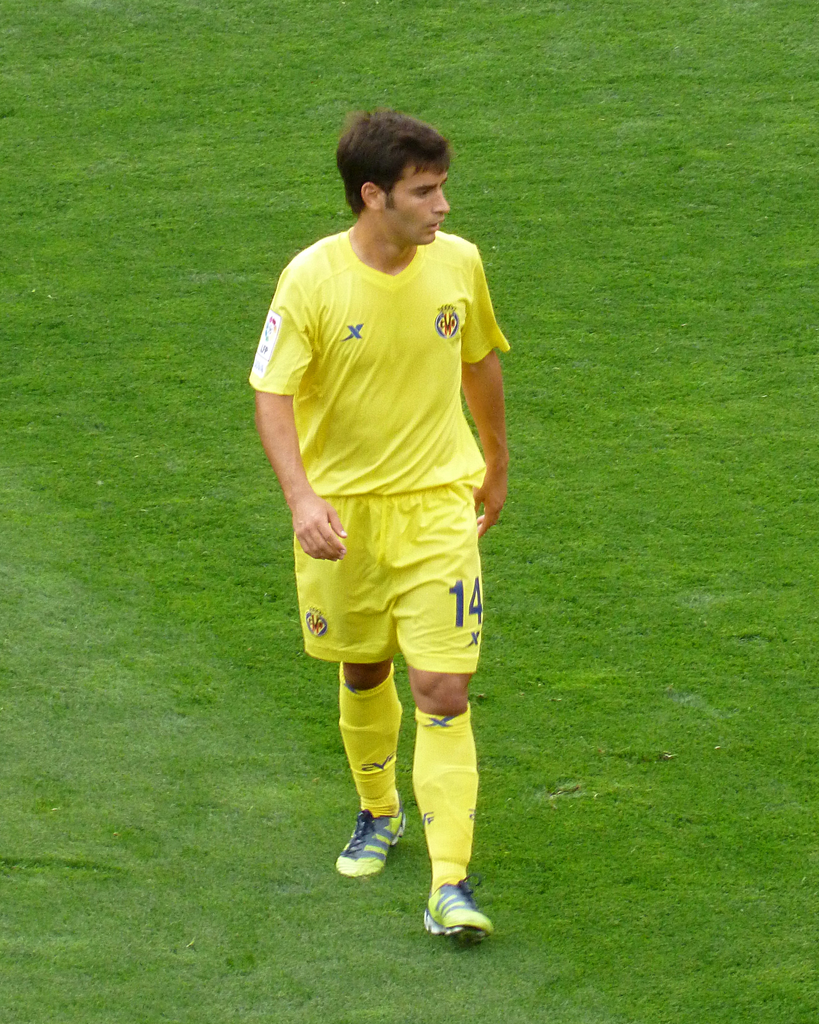 Manu Trigueros en el partit Vila-real CF "B" en front del Deportivo de La Corunya a l'última jornada de la Segona Divisió Espanyola 2011-12 a l'estadi de El Madrigal.